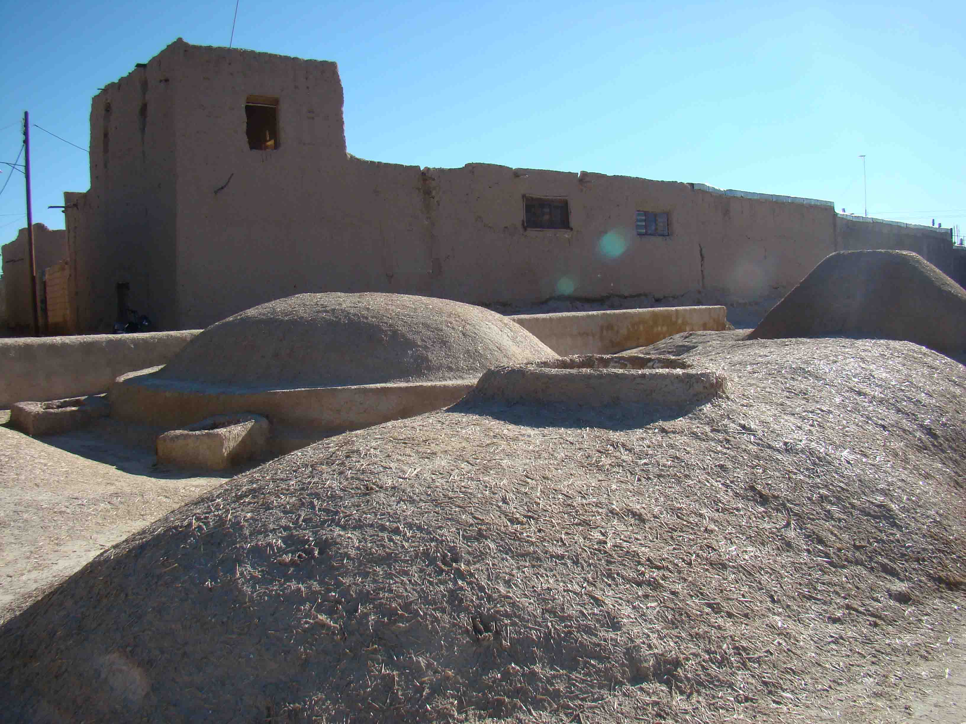 حمام خضر جويم نمای سقف حمام